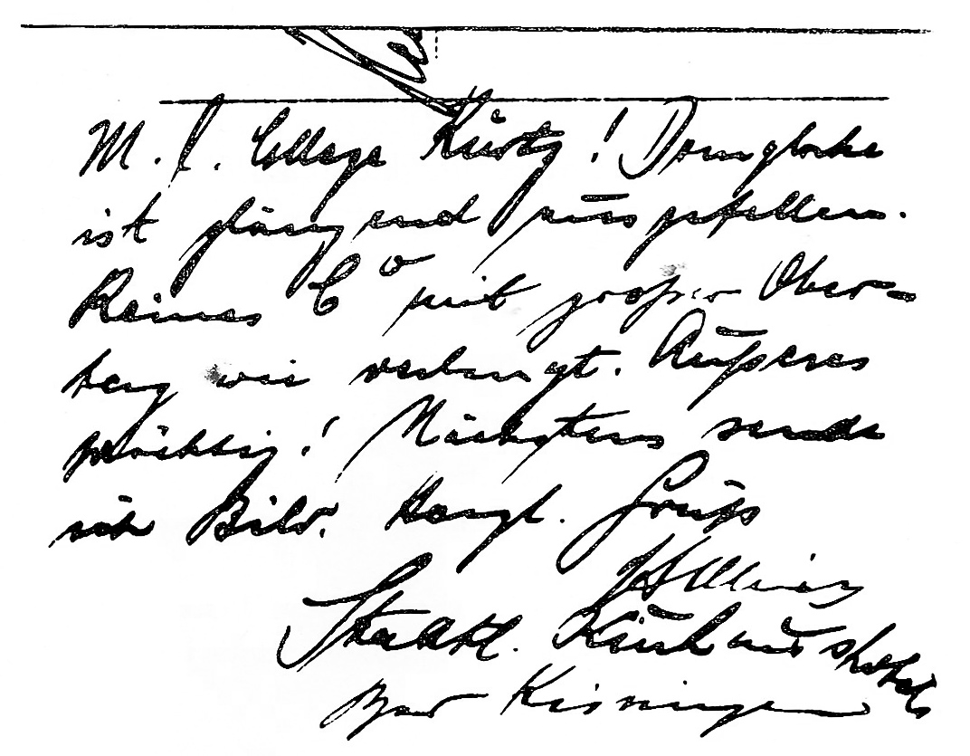 Faksimile einer Postkarte von Heinrich Ulrich (Glockengießer) an seinen Kollegen Kurtz, nachdem er die Kölner St.-Petersglocke gegossen hatte: „Domglocke ist glänzend ausgefallen. Reines C0 mit großer Oberterz wie verlangt. Äußeres prächtig.[1]“